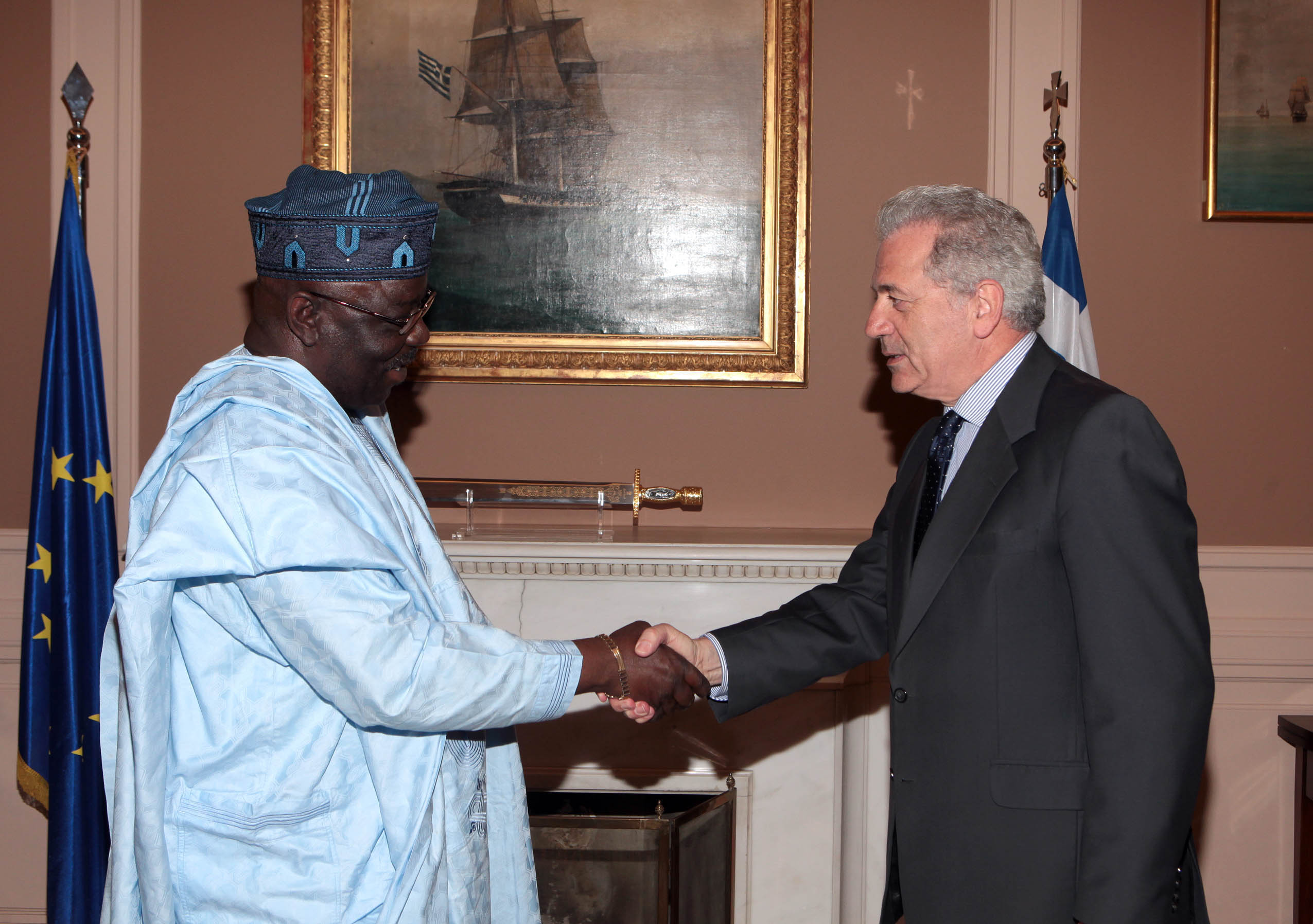 Την Τρίτη 26 Μαρτίου 2013 ο Υπουργός Εξωτερικών Δημήτρης Αβραμόπουλος συναντήθηκε στο Υπουργείο Εξωτερικών με τον Πρέσβη της Oμοσπονδιακής Δημοκρατίας της Νιγηρίας κ. Ayodeji Lawrence Ayodele